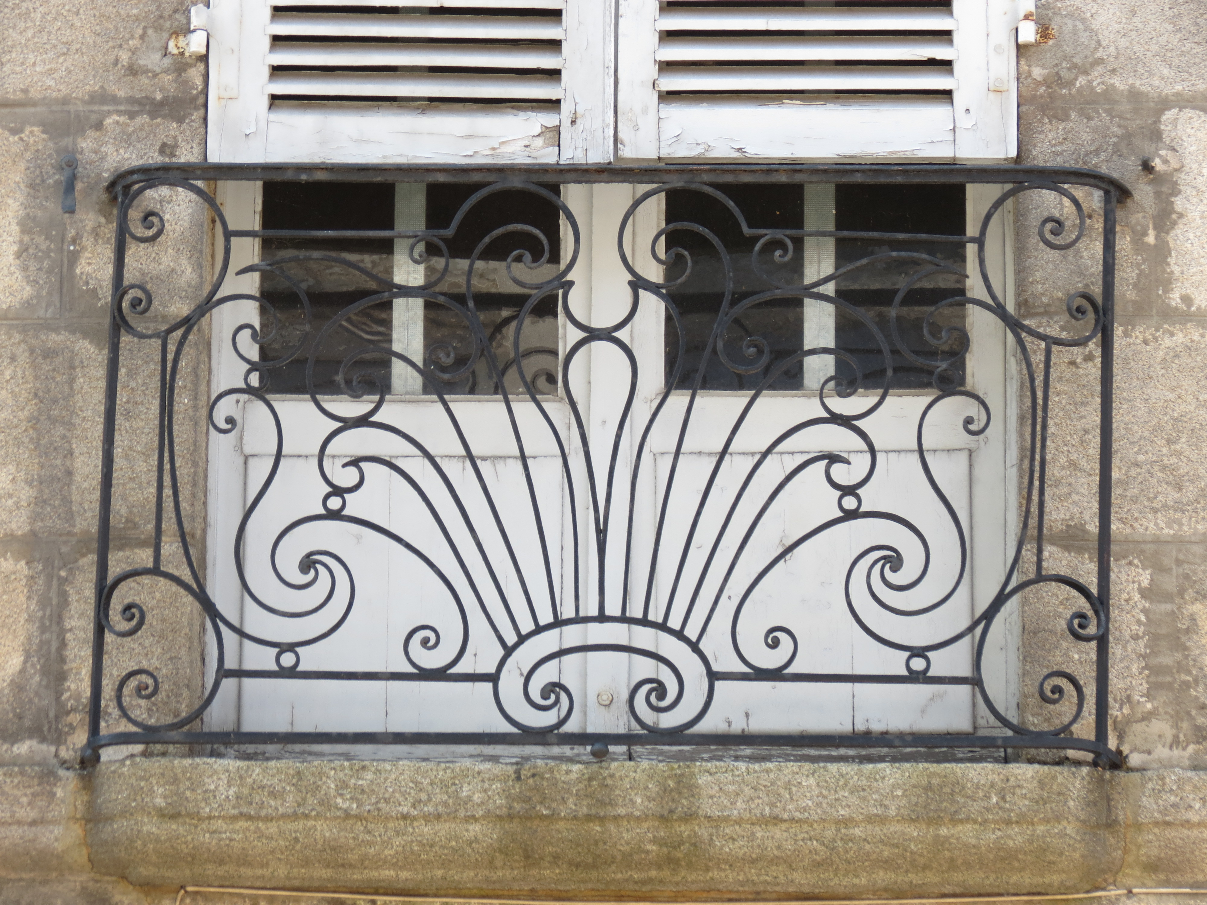 Maison, 31, 33 rue du Jeudi, Alençon, Orne, Normandie.